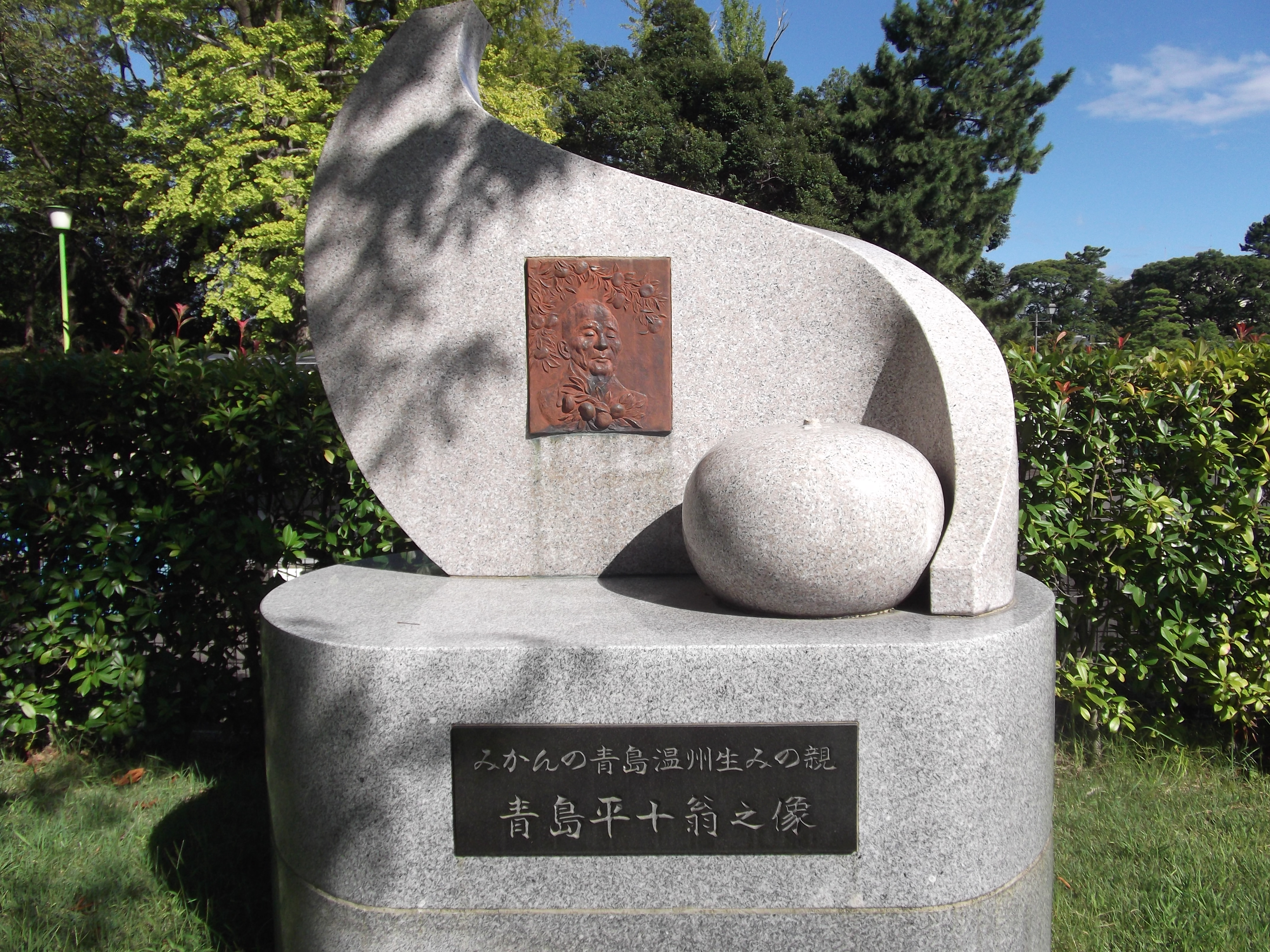 駿府城公園にある、青島温州の発見者、青島平十の像。